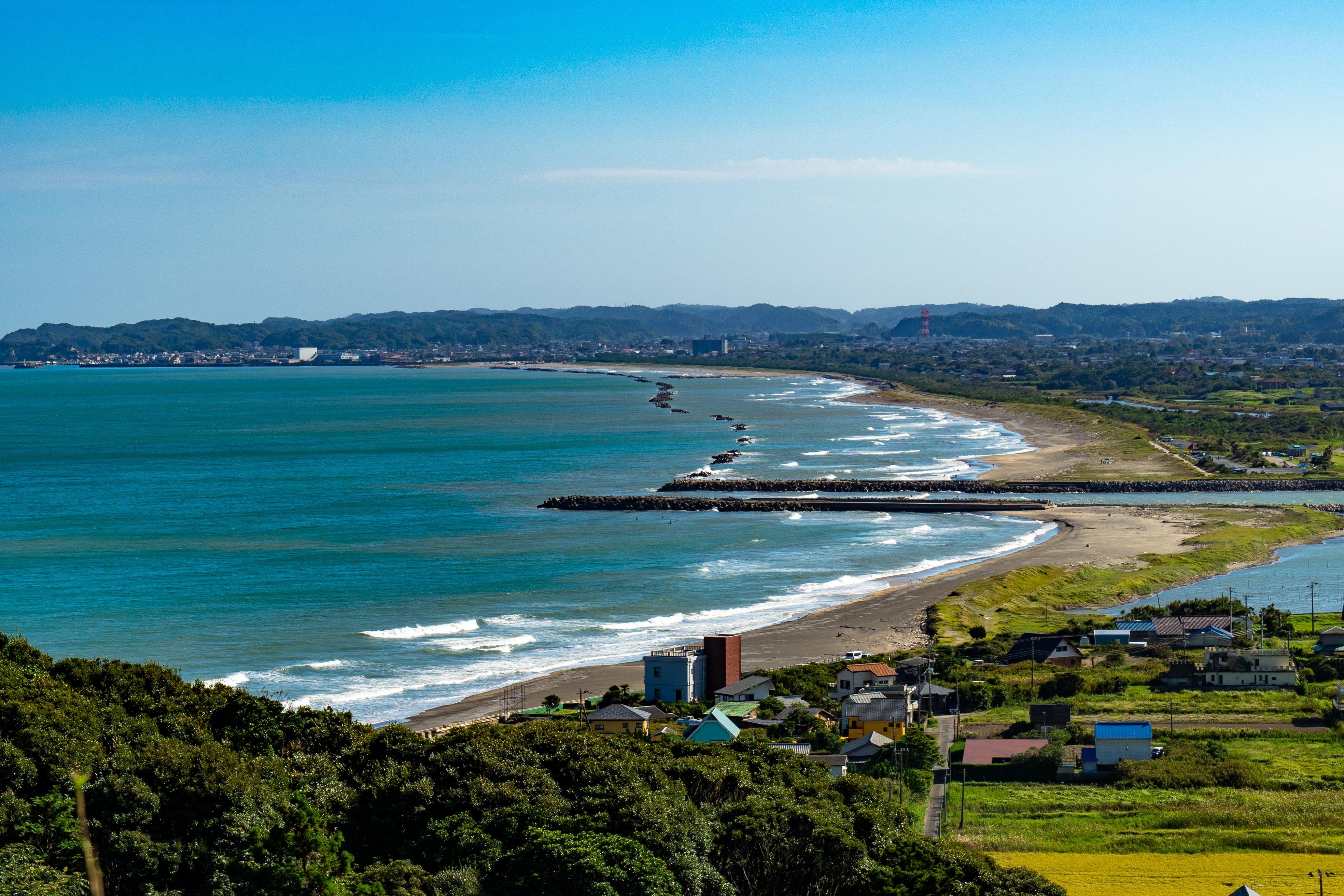 千葉県いすみ市の日在浦と和泉浦。太東埼灯台付近から南を撮影。